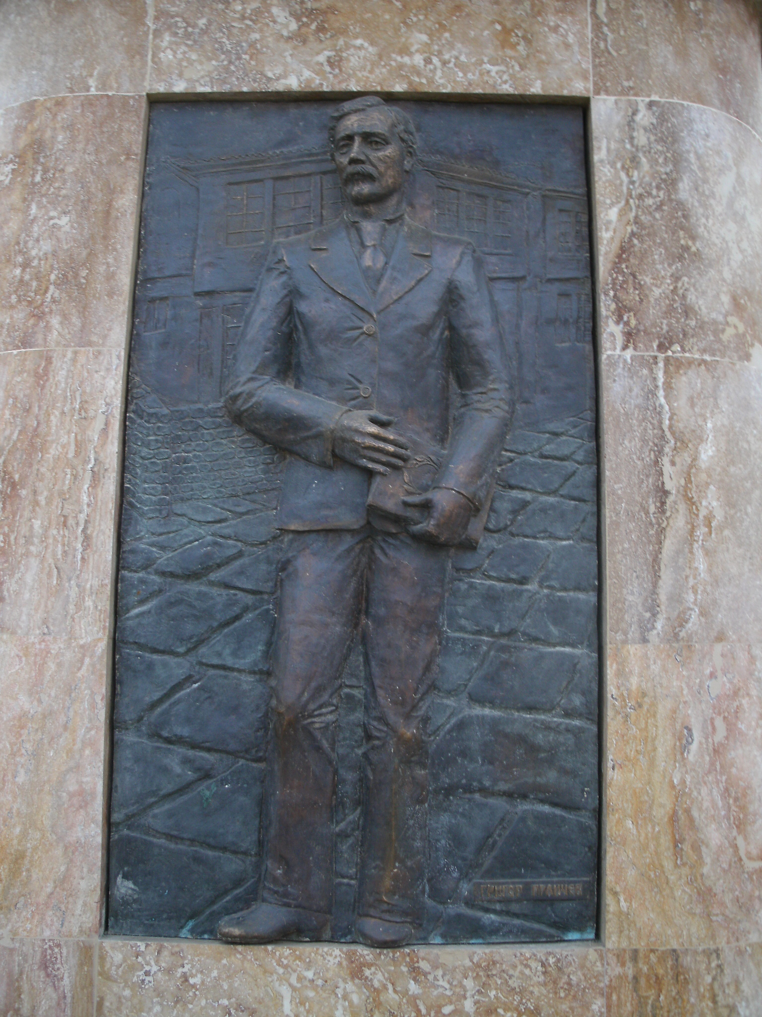 Прличев, дел од споменикот Лавови во Скопје